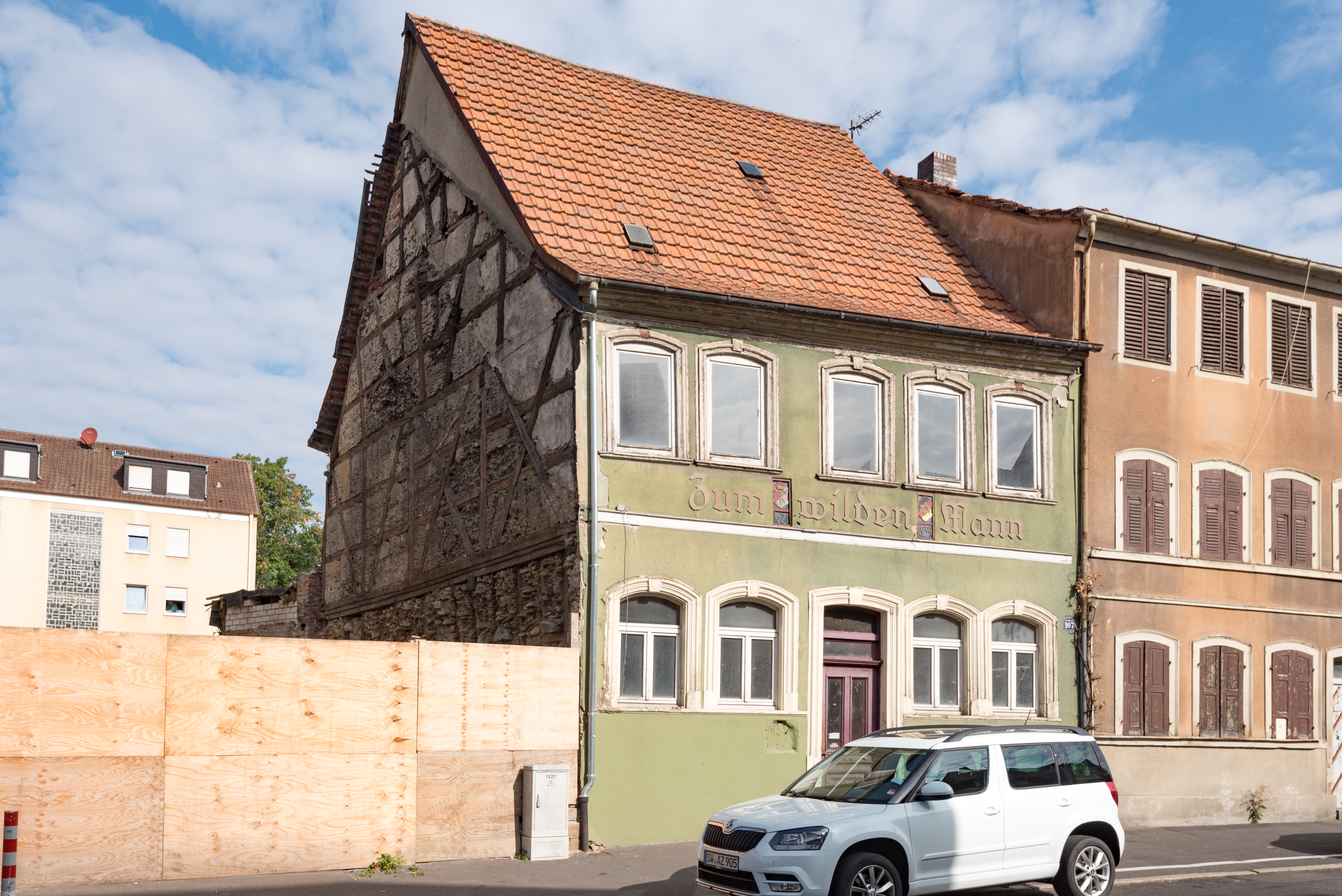 Schweinfurt, Bauerngasse 107